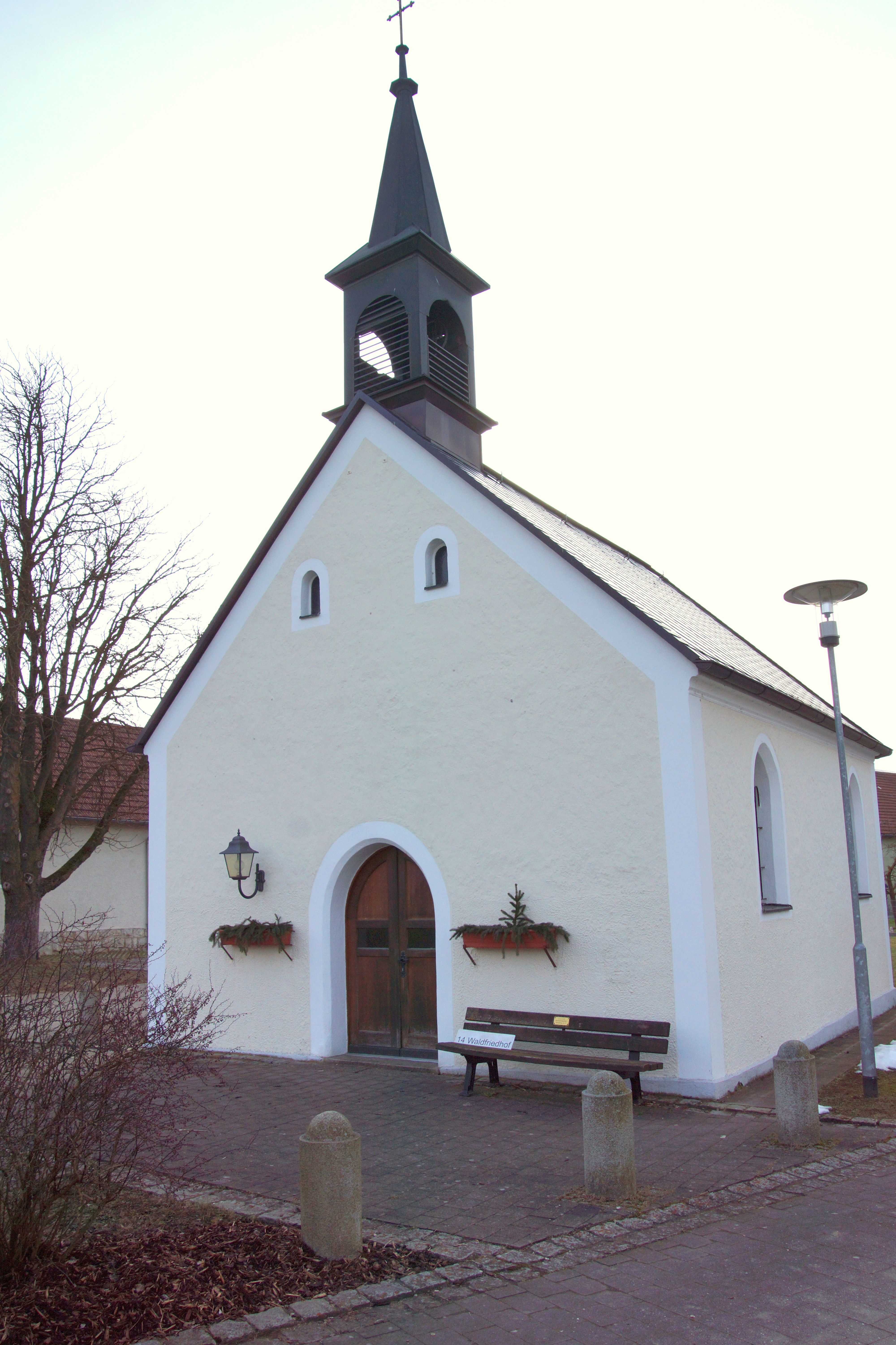 Die Dreifaltigkeitskapelle / Ortskapelle in Gailoh bei Amberg